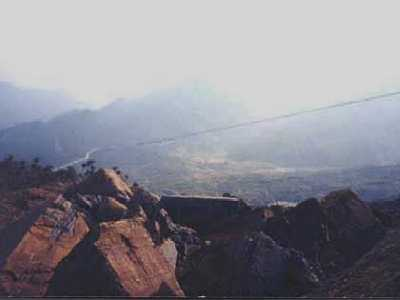 中文（台灣）: 南投縣國姓鄉921大地震爆發處崁斗山,對面九份二山